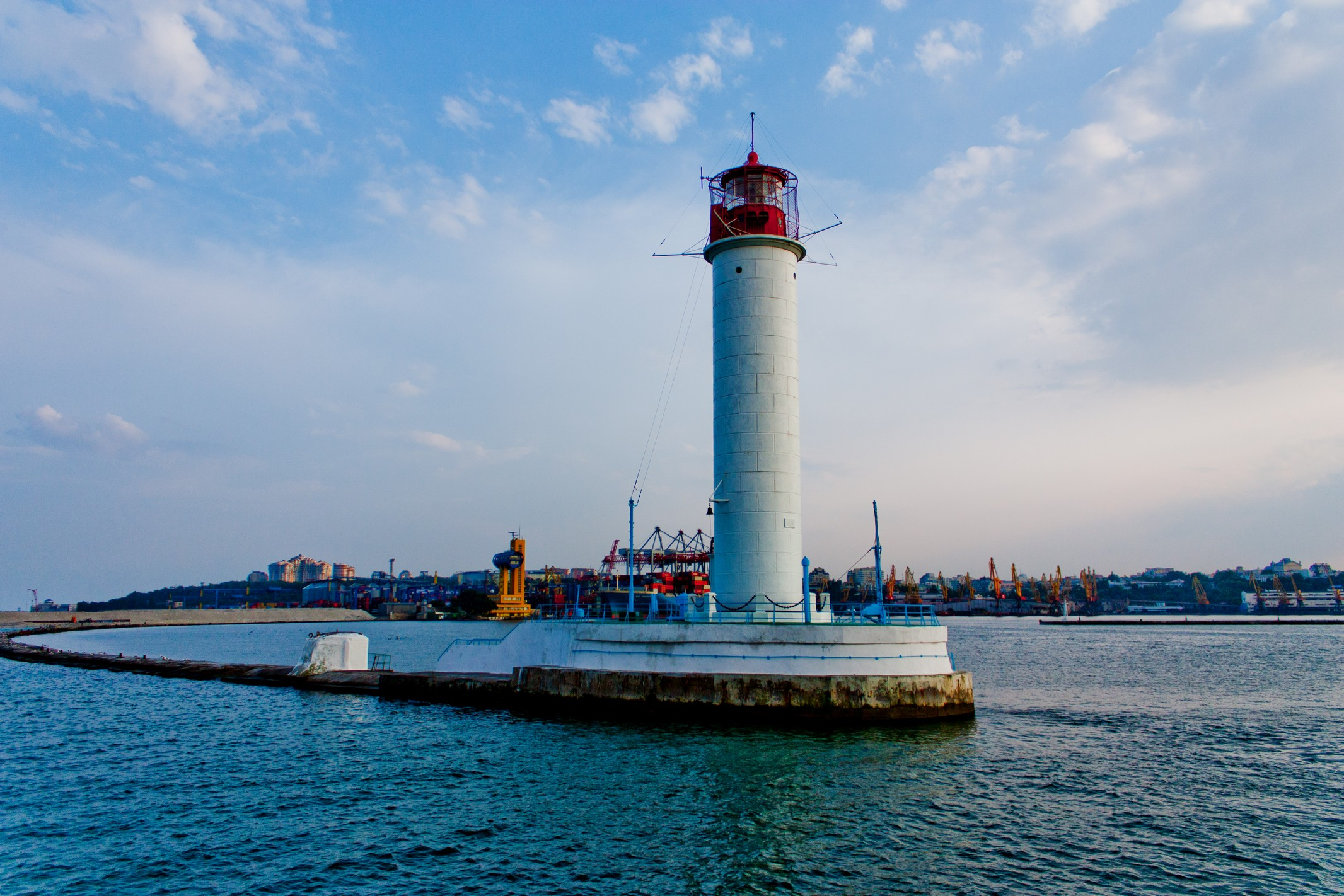 Воронцовський маяк, Одеса, Одеський морський торгівельний порт, Рейдовий мол